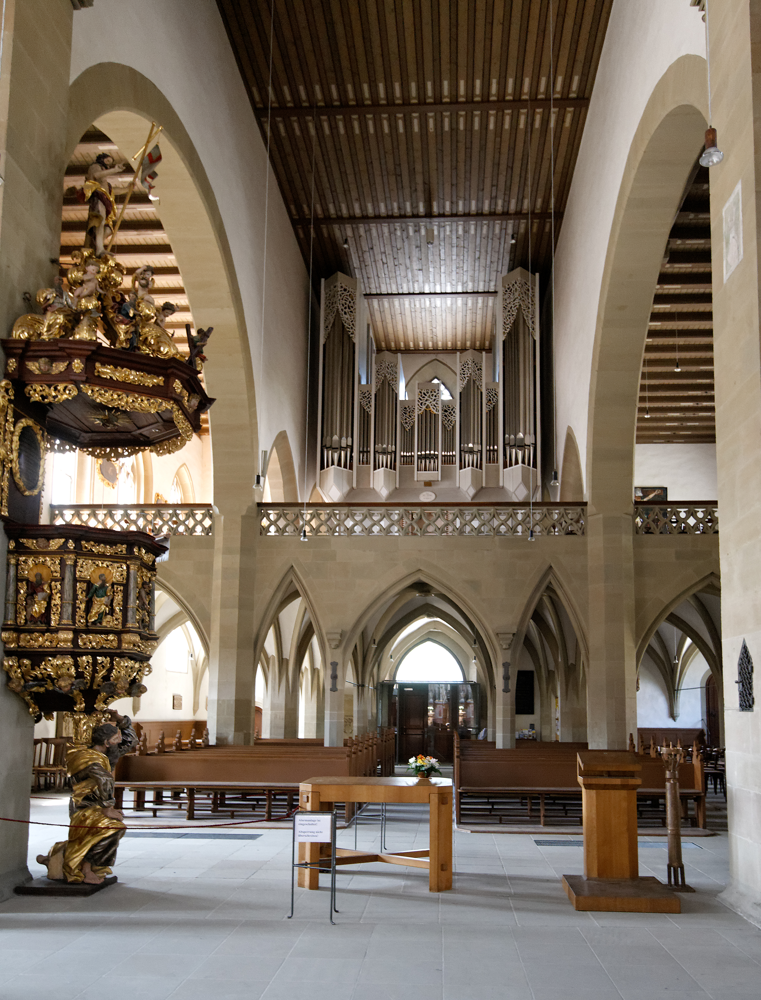 Kirche St. Johannis in Schweinfurt, Blick vom Altar aus.